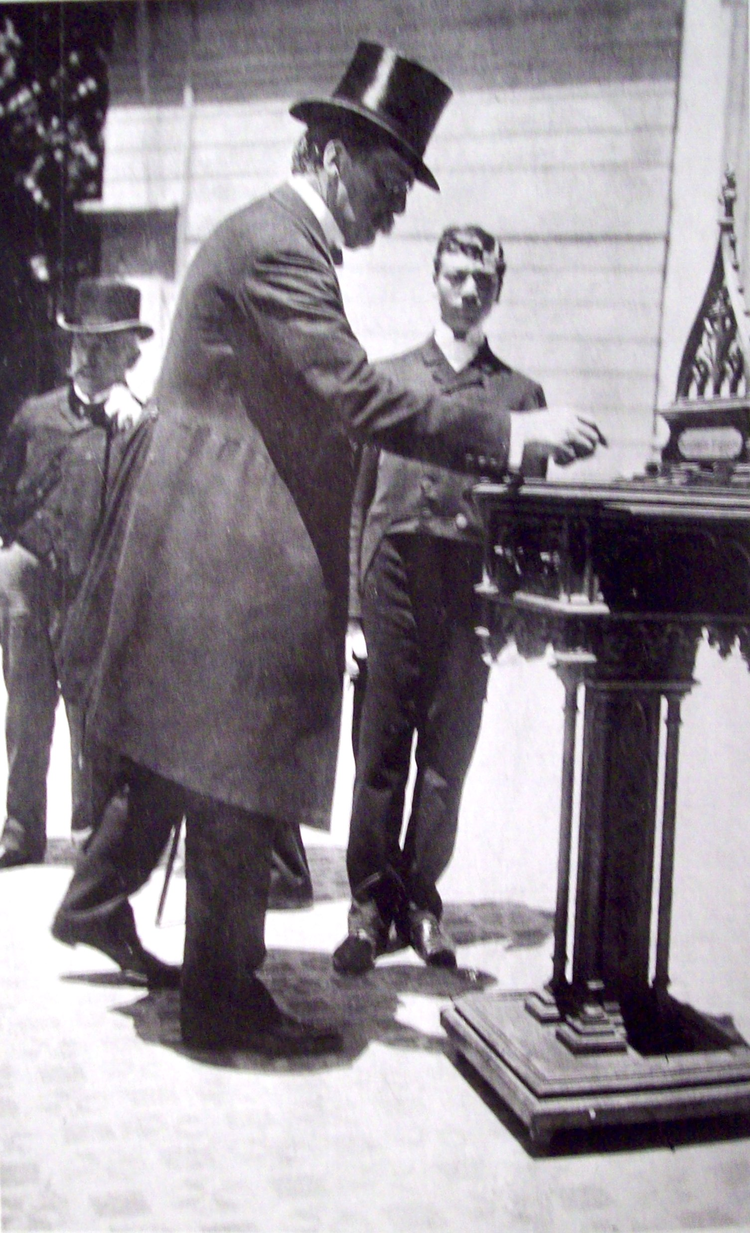 El político argentino Carlos Pellegrini (presidente 1890-1892) votando en un atrio de iglesia, en la época en que no existía el cuarto oscuro.